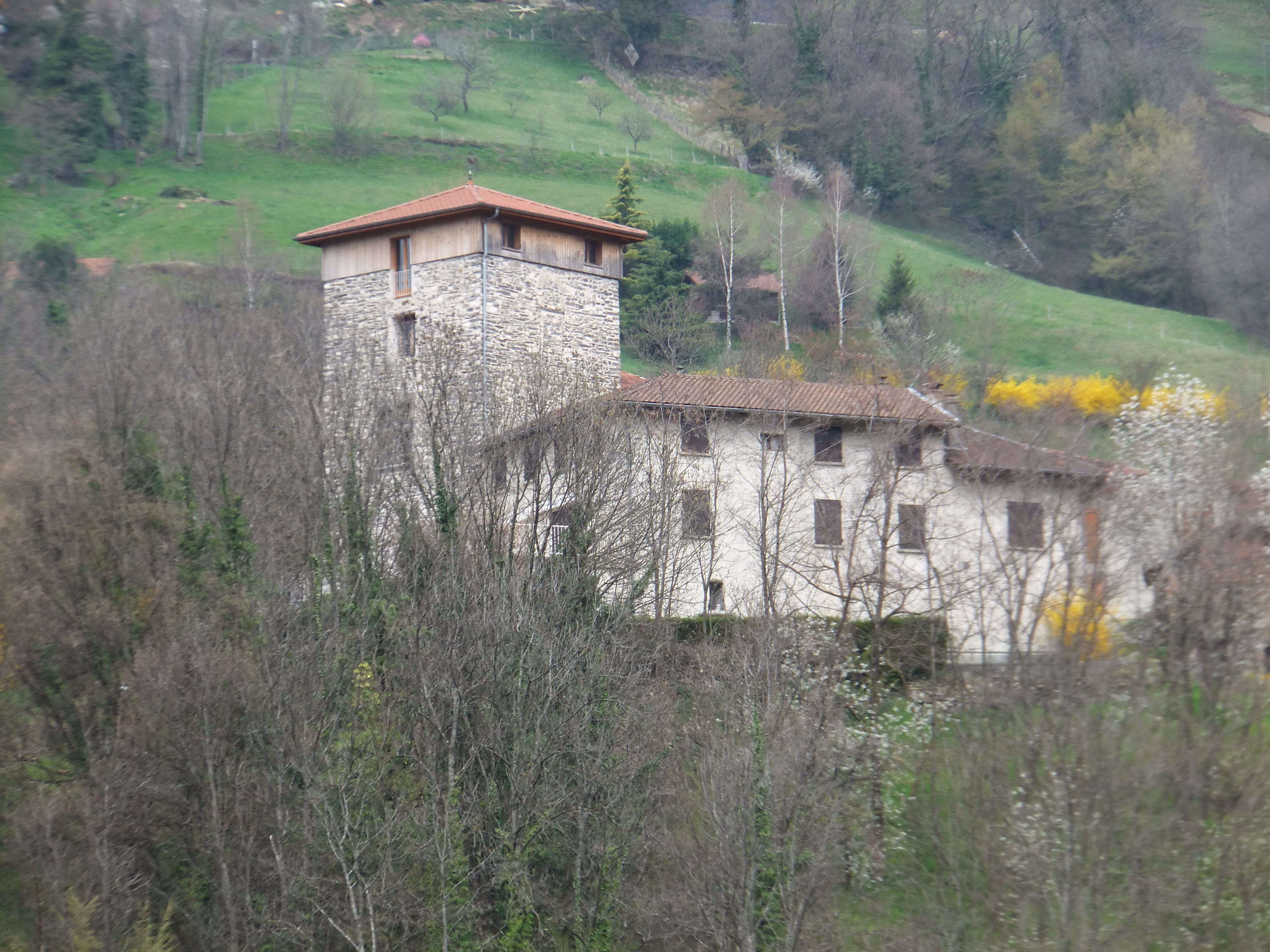 La maison forte des Seigneurs de Mailles, construite au XIe ou XIIe siècle a donné son nom au hameau de Mailles, un des composants de la commune historique de Morêtel de Mailles.